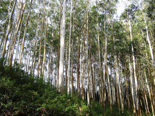 Gudalur, Tamil Nadu, India.